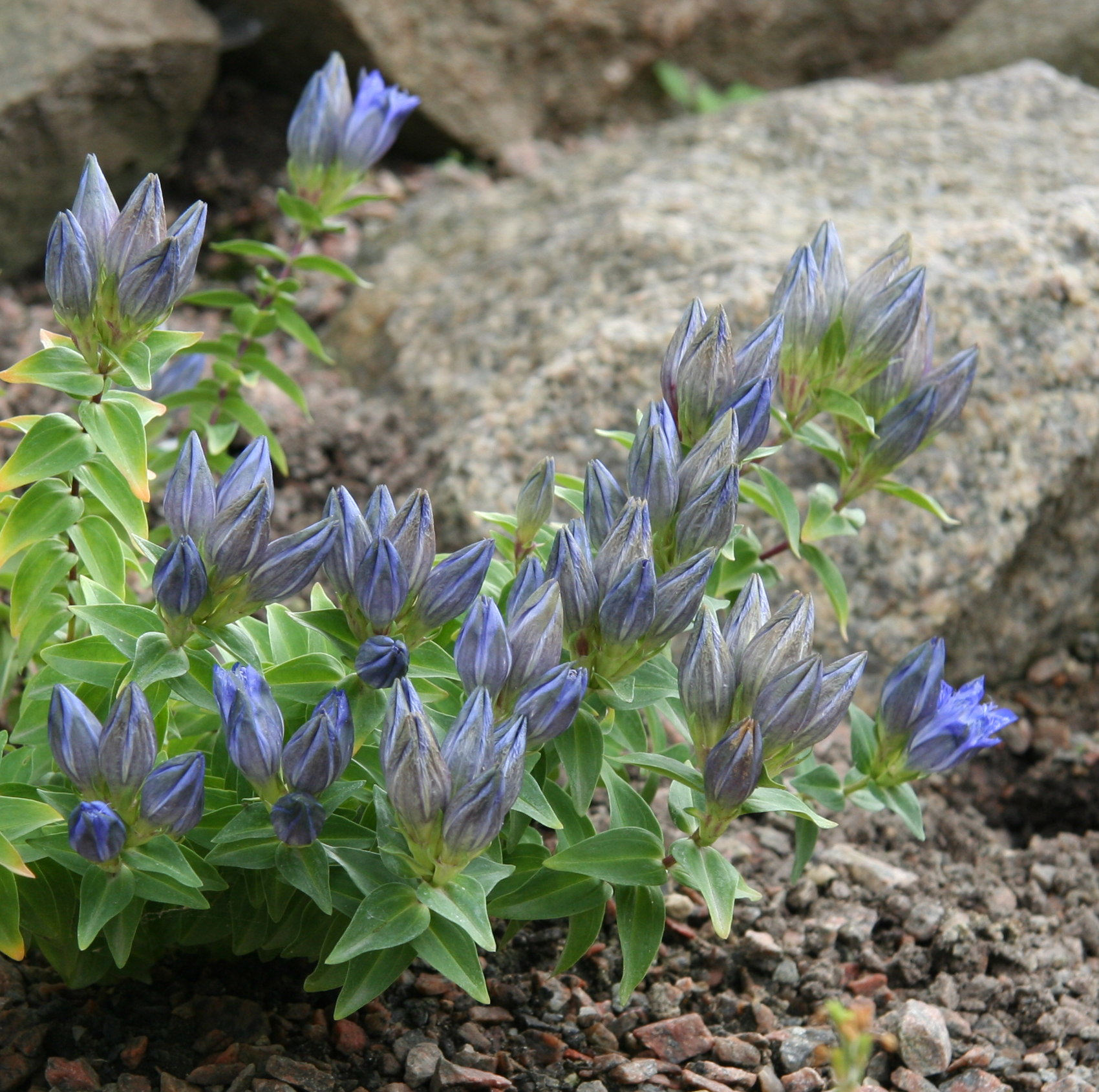 Gentiana septemfida im Botanischen Garten Kopenhagen